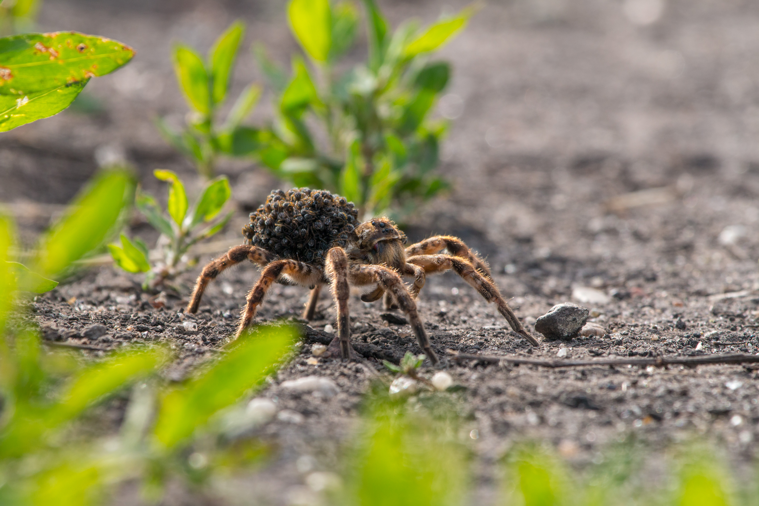 Lycosa singoriensis